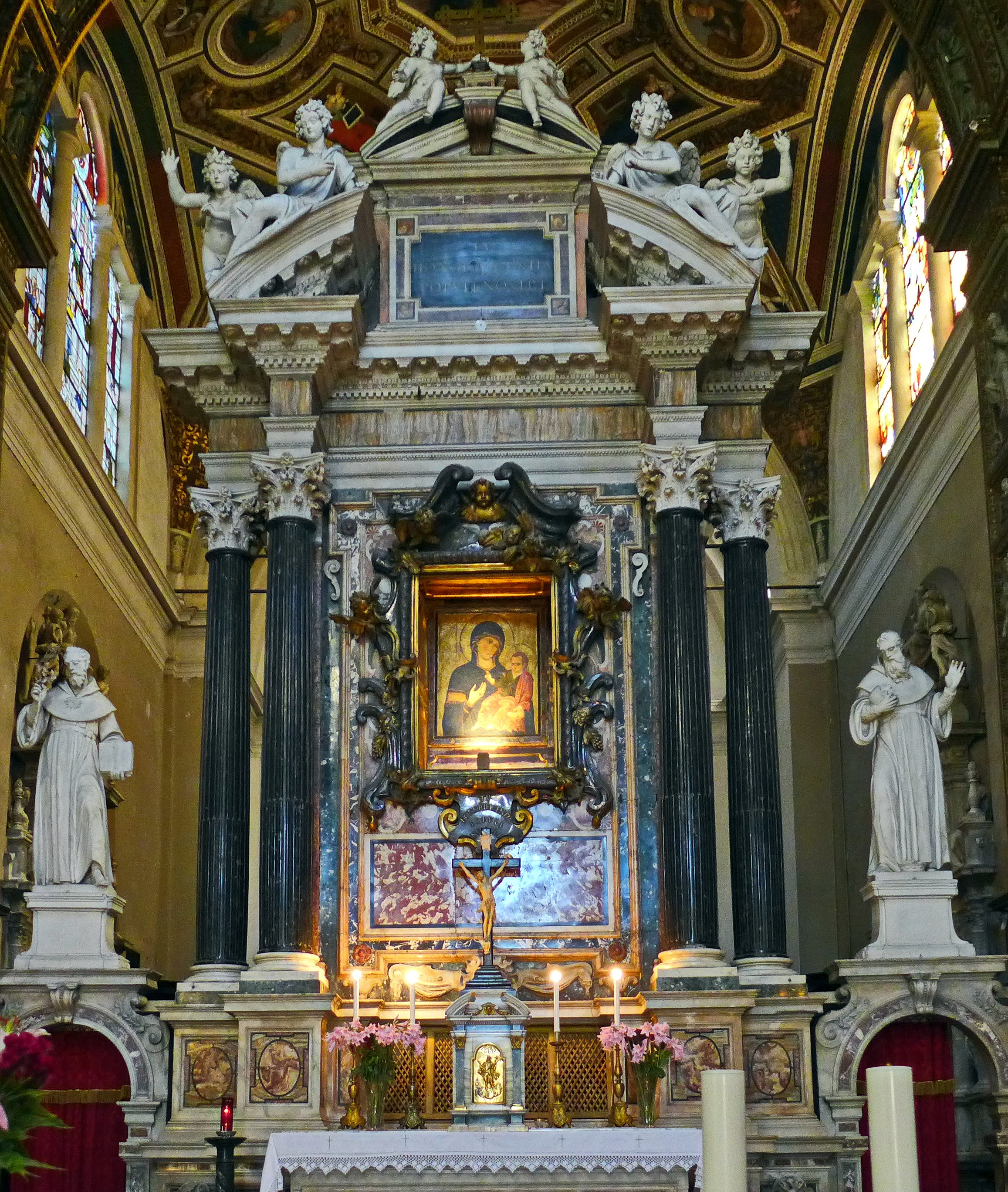 Santa Maria del Popolo Hochaltar